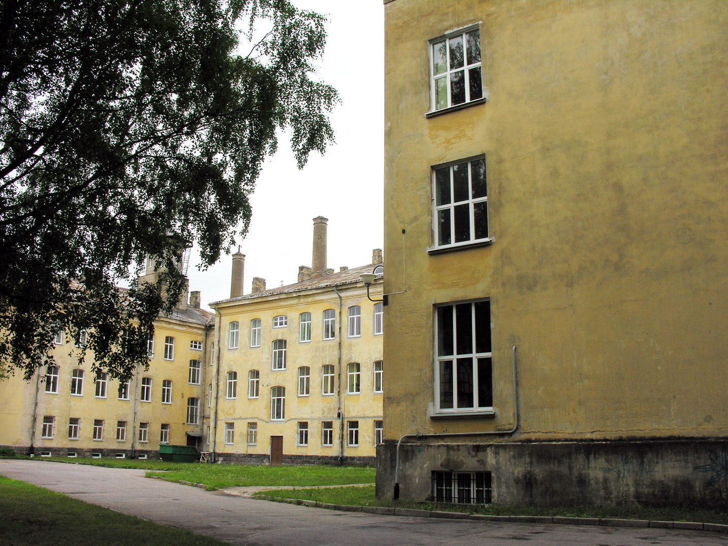 VU medicinos fakultetas Centrinis korpusas iš kiemo pusės Foto: Algirdas, 2006 m. rugpjūčio 8 d., Lietuva